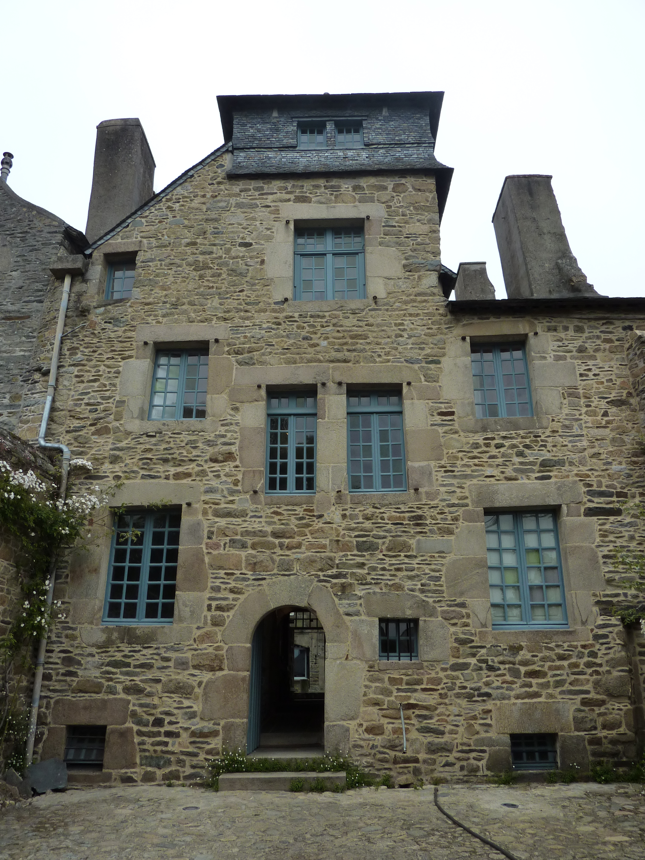 Tréguier : maison d'Ernest Renan, façade arrière donnant sur le jardin